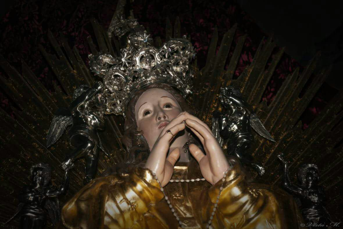 Volto della Statua di Maria SS degli Angeli, Pignola.